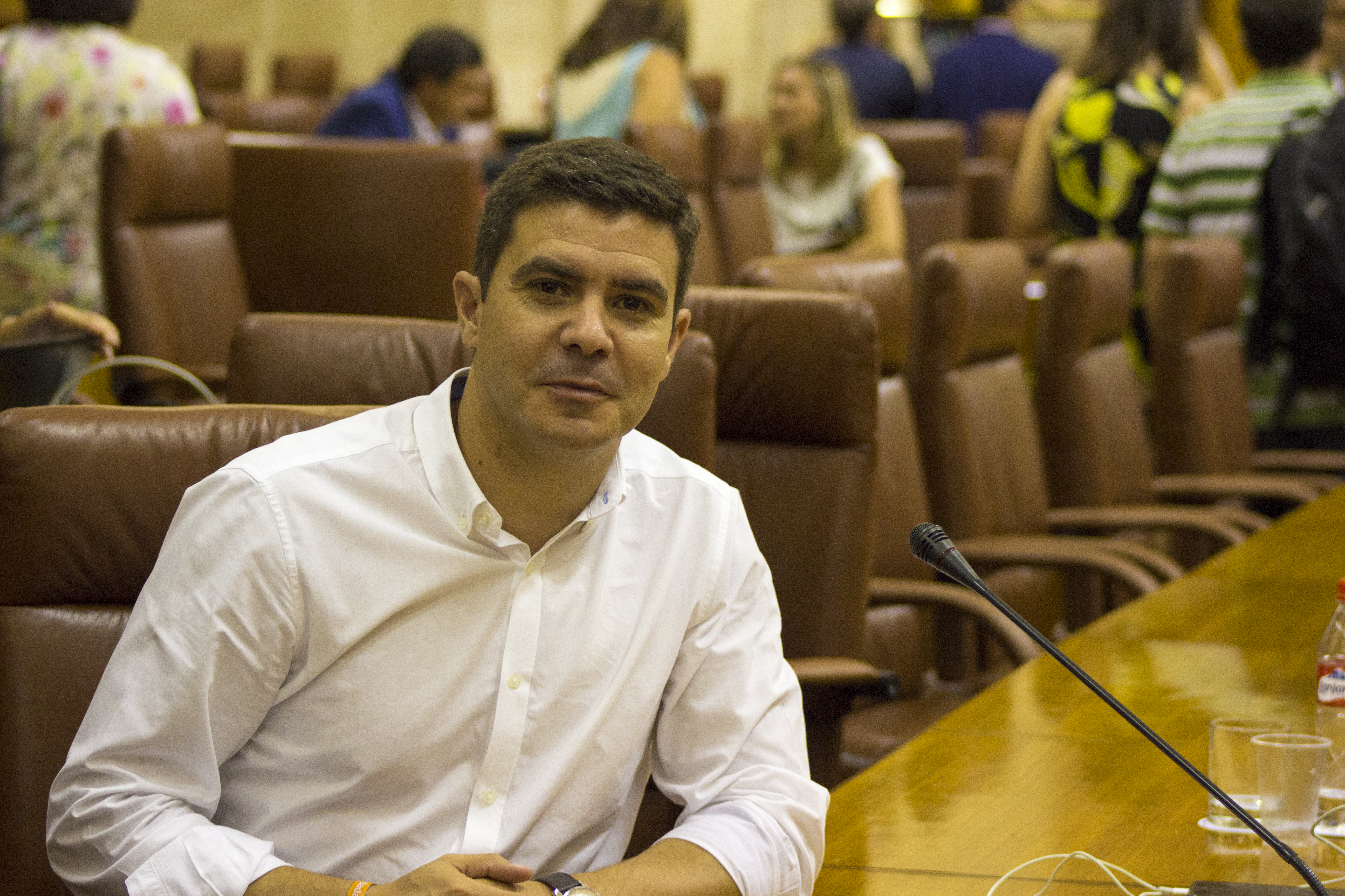 Diputado en el Parlamento de Andalucía por Ciudadanos - C's.